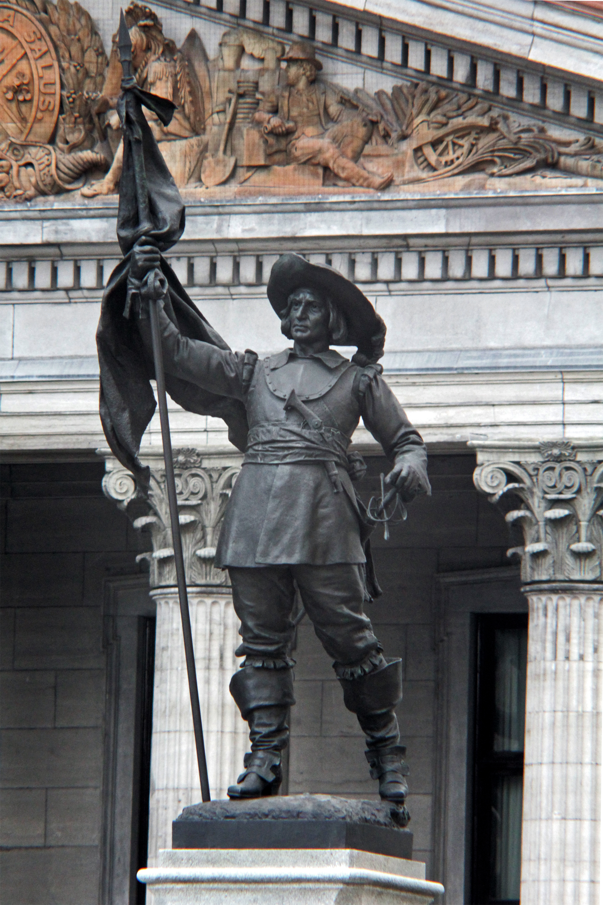 Monument à Maisonneuve à la Place d'Armes, Montréal.